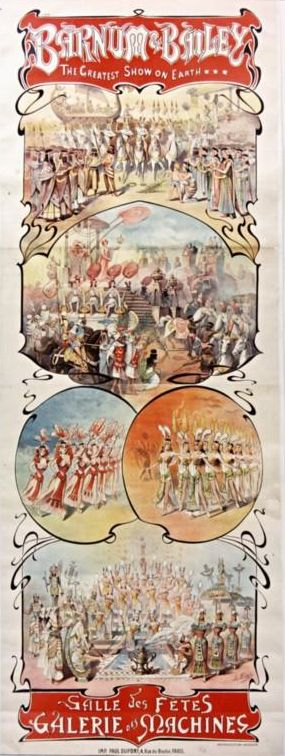 Barnum & Bailey, greatest show on earth. Salle des fêtes. Galerie des Machines : affiche A. Edel